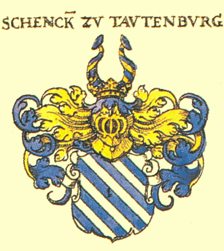 Wappen des Thüringischen Adelsgeschlechts der Schenk zu Tautenburg (ab 1520 Freiherren)